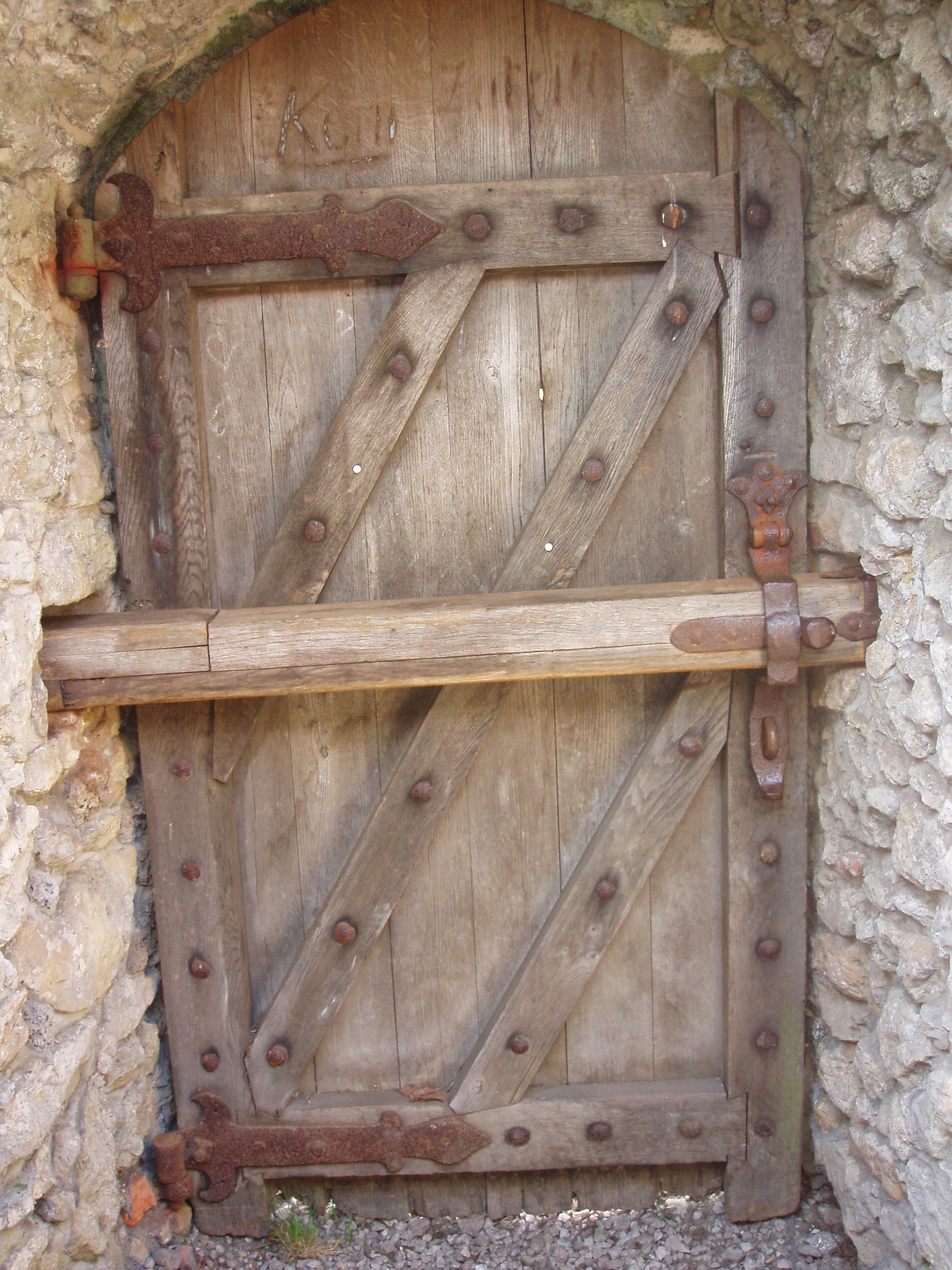 Burg Veldenstein, Bunkerecke